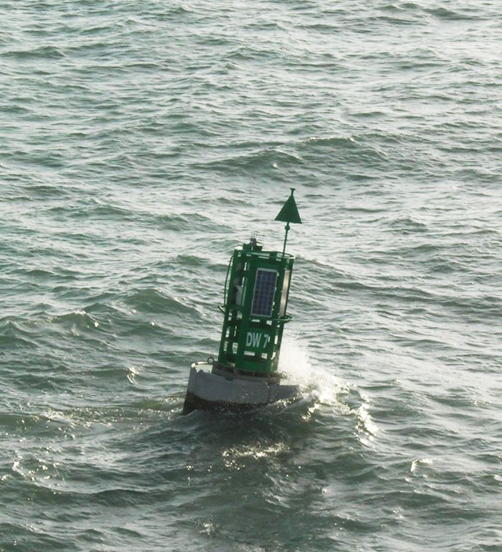 Description =Bouée du chenal d'accés au port de Dunkerque Source =Photo taken by Remi Jouan Date =Novembre 2006 Author =Remi Jouan